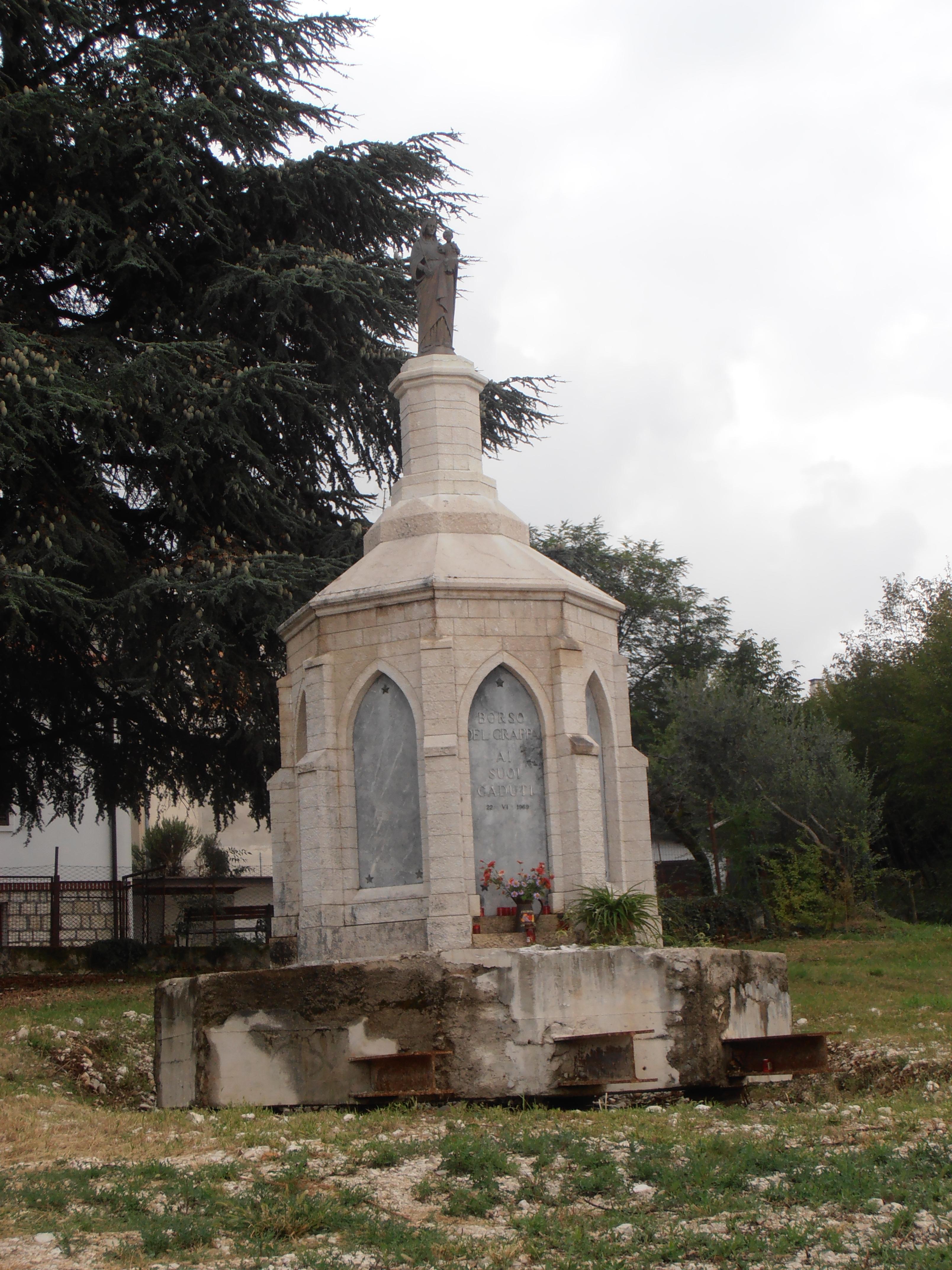 Borso del Grappa (Italie) Monument